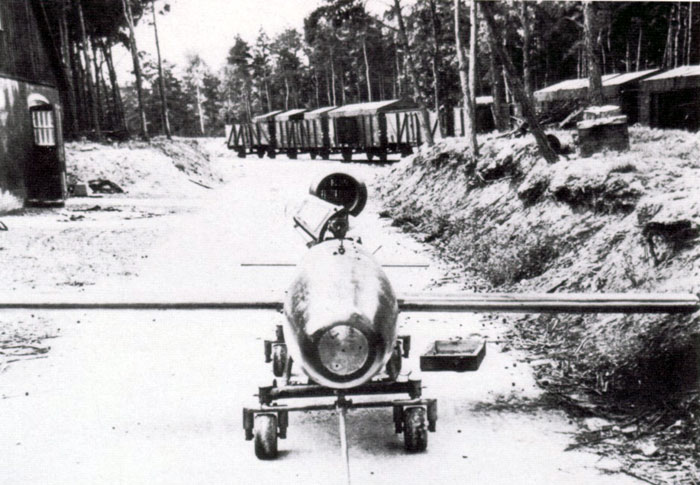 Von Engländern erbeutete "Reichenberg" auf dem Gelände der Luftmuna Neu Tramm bei Dannenberg